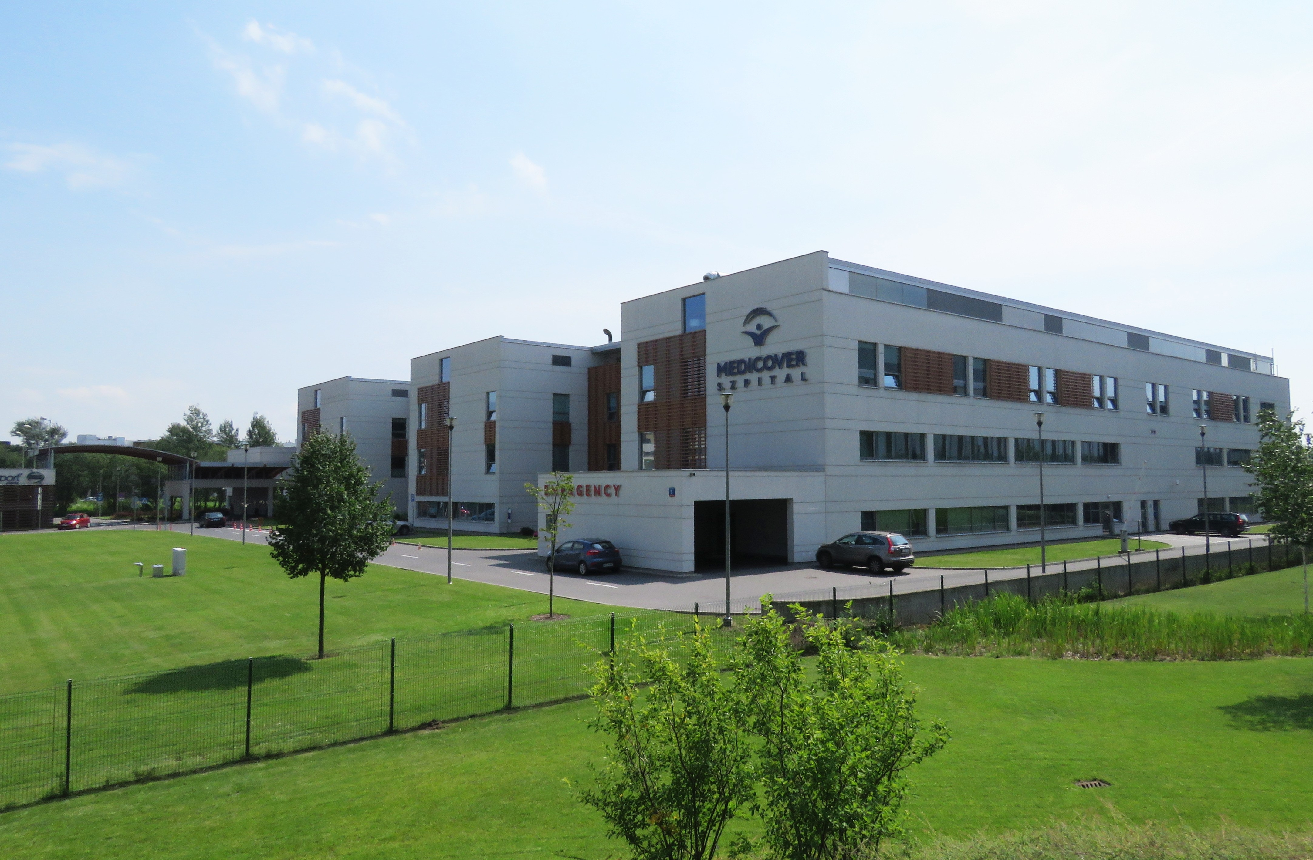 Szpital Medicover w Warszawie